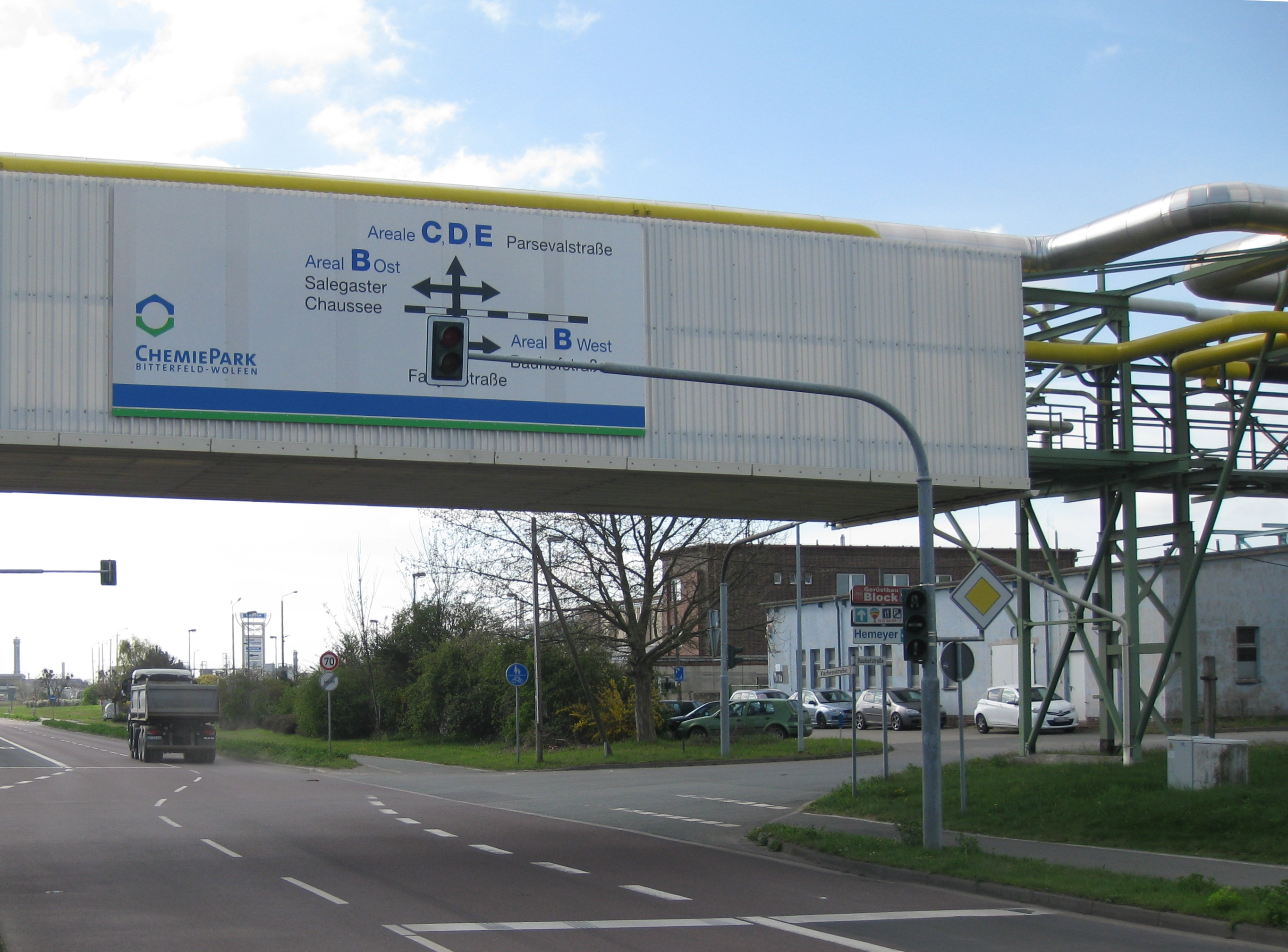 Chemiepark Bitterfeld-Wolfen, Areal B